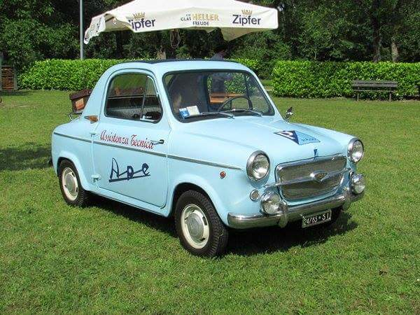 Vespa 400 accessoriata Ardor